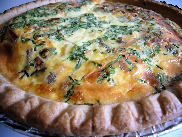 Quiche.